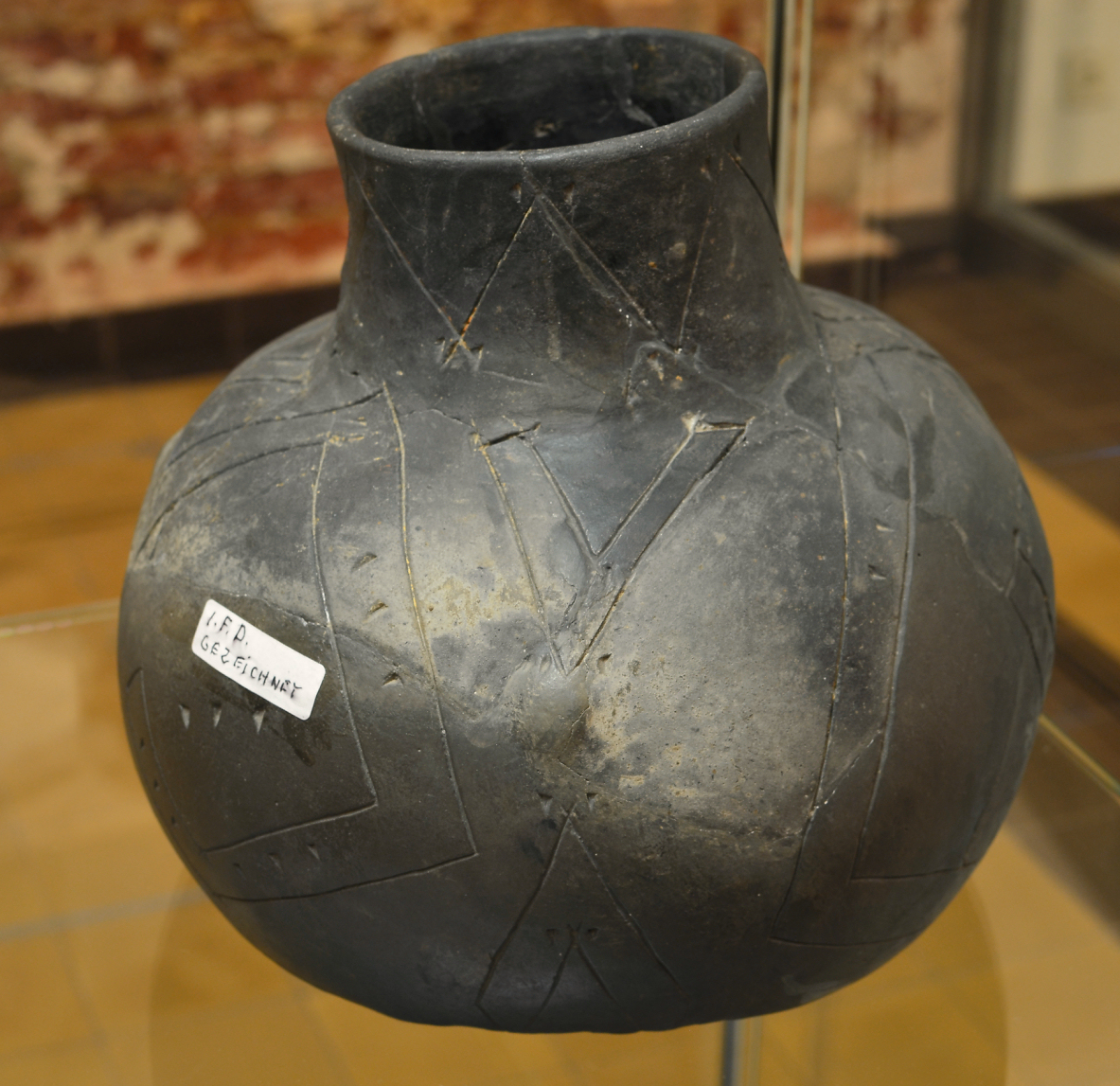 Gefäß der Bandkeramischen Siedlung Rössing, entdeckt von Wolfgang Bauer, ausgestellt im Niedersächsischen Landesamt für Denkmalpflege